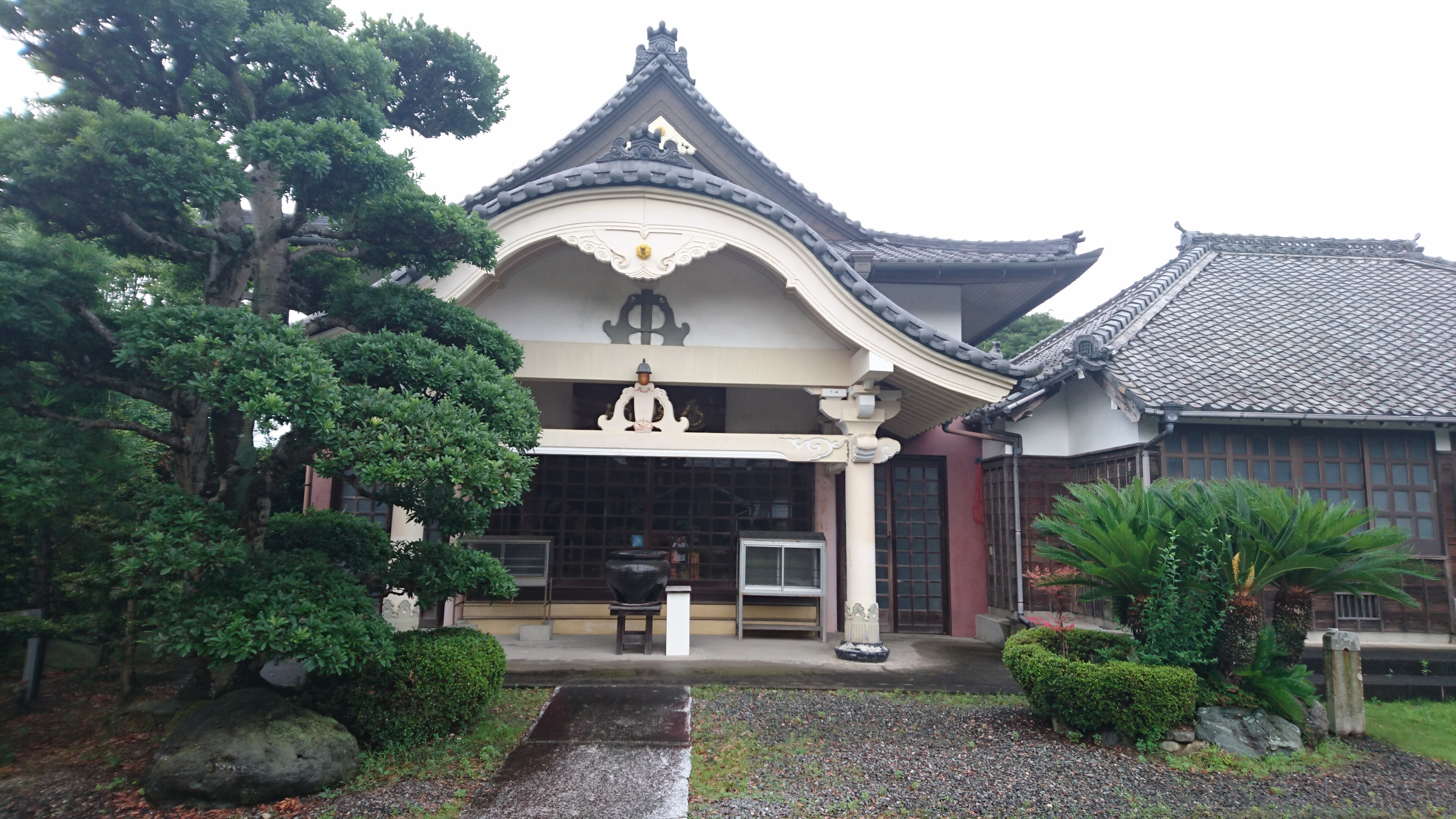 愛知県知多郡武豊町にあるお寺